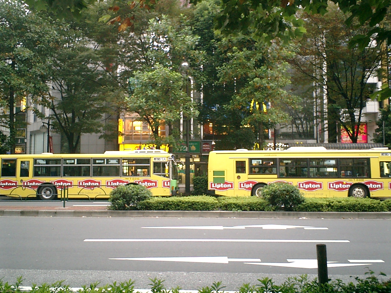 Toei Bus